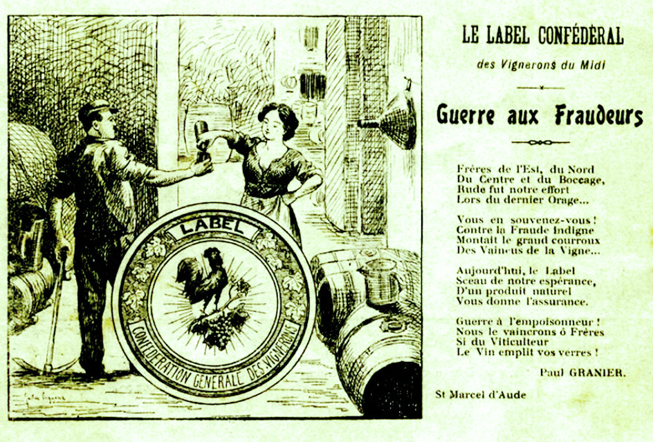 Label confédéral des vignerons du Midi "Guerre aux fraudeurs"